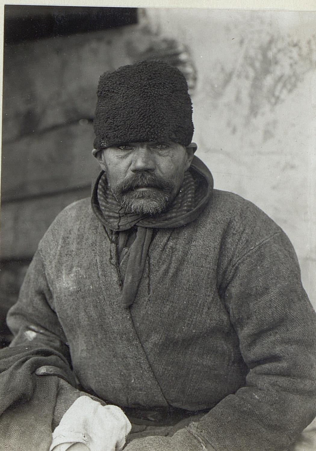 Darstellung ziviler Personen am russischen Kriegsschauplatz